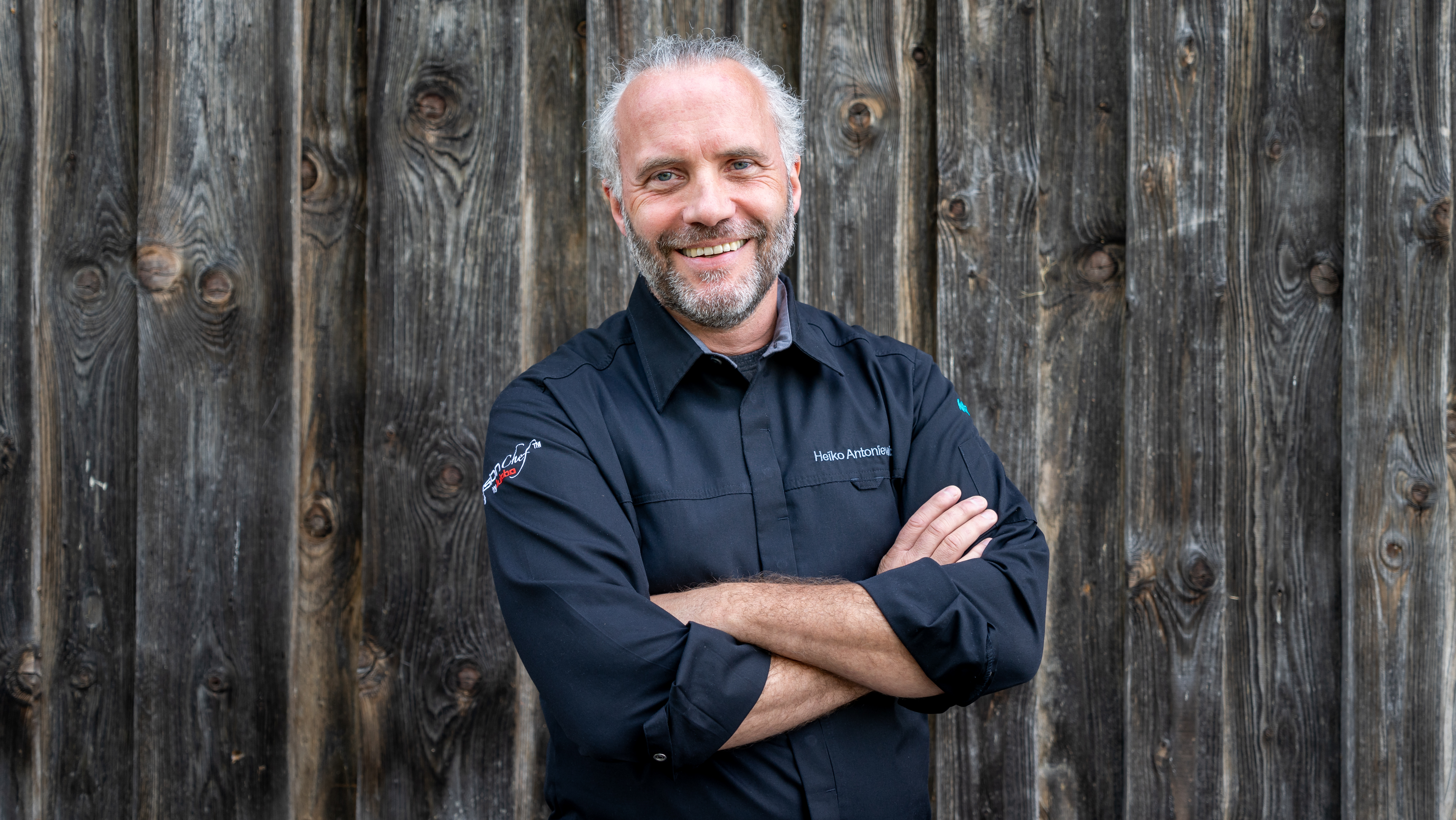 Das Bild zeigt den Koch Heiko Antoniewicz in Kochjacke vor einer Holzwand